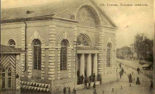 Synagoga Rumiancewa w Homlu